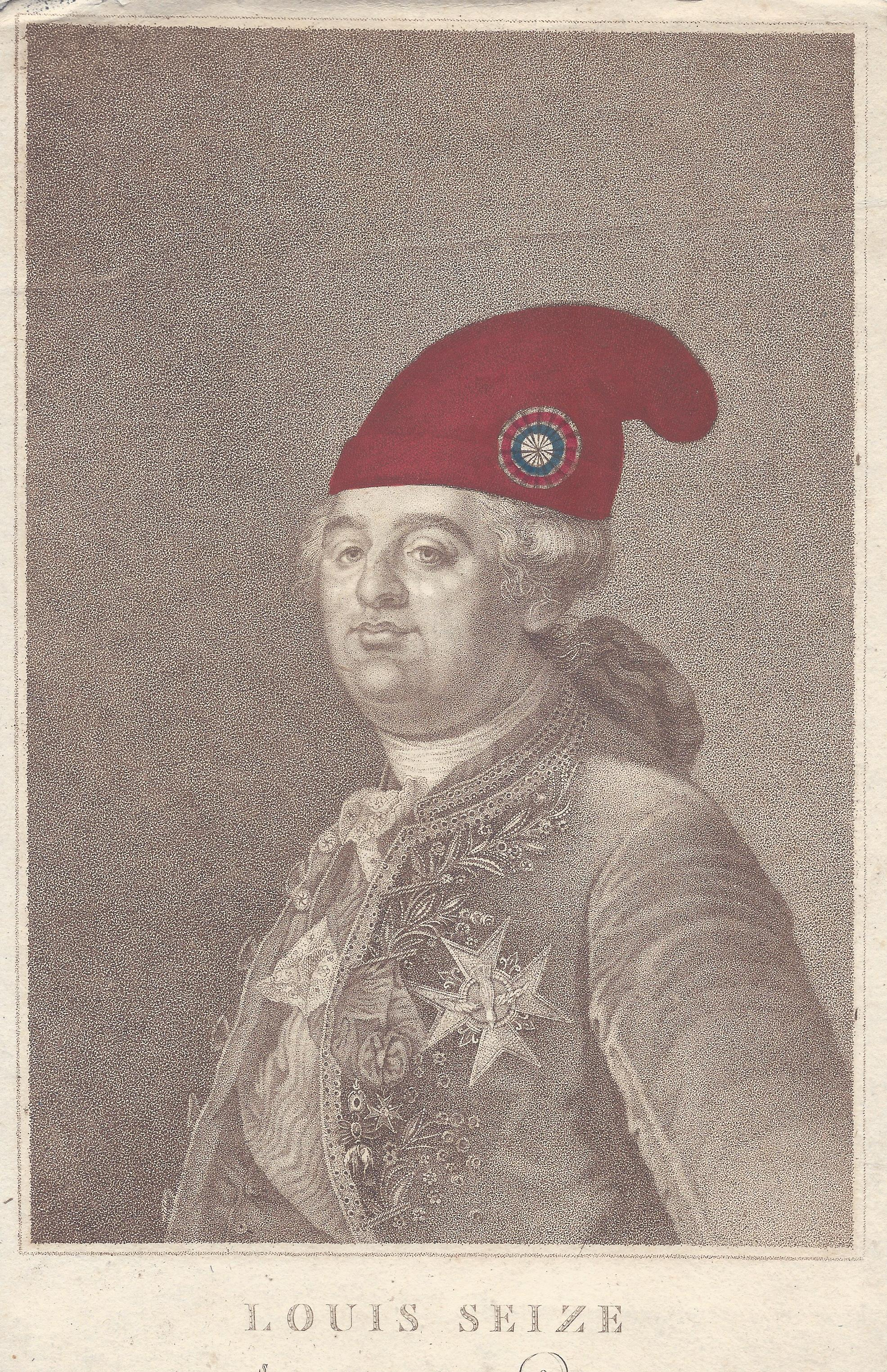 Ludwig XVI. mit neuer Mütze, 1792. Schriftzug vollständig: LOUIS SEIZE / ROI DEs FRANCEAIS / Né à Versailles le 23 Août 1754. Marié le 16 May 1770 et Sacré à Reims le 11 Juin 1775. / Bonnet de la Liberté, Présenté au Roi par le peuple Francais, le 20. Juin 1792.